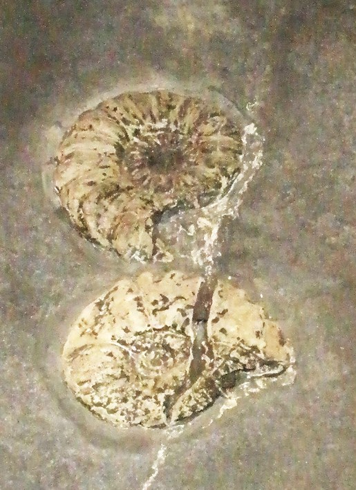 Fossil of Parakellnerites, an extinct mollusc. - Took the photo at Museo dei Fossili di Besano